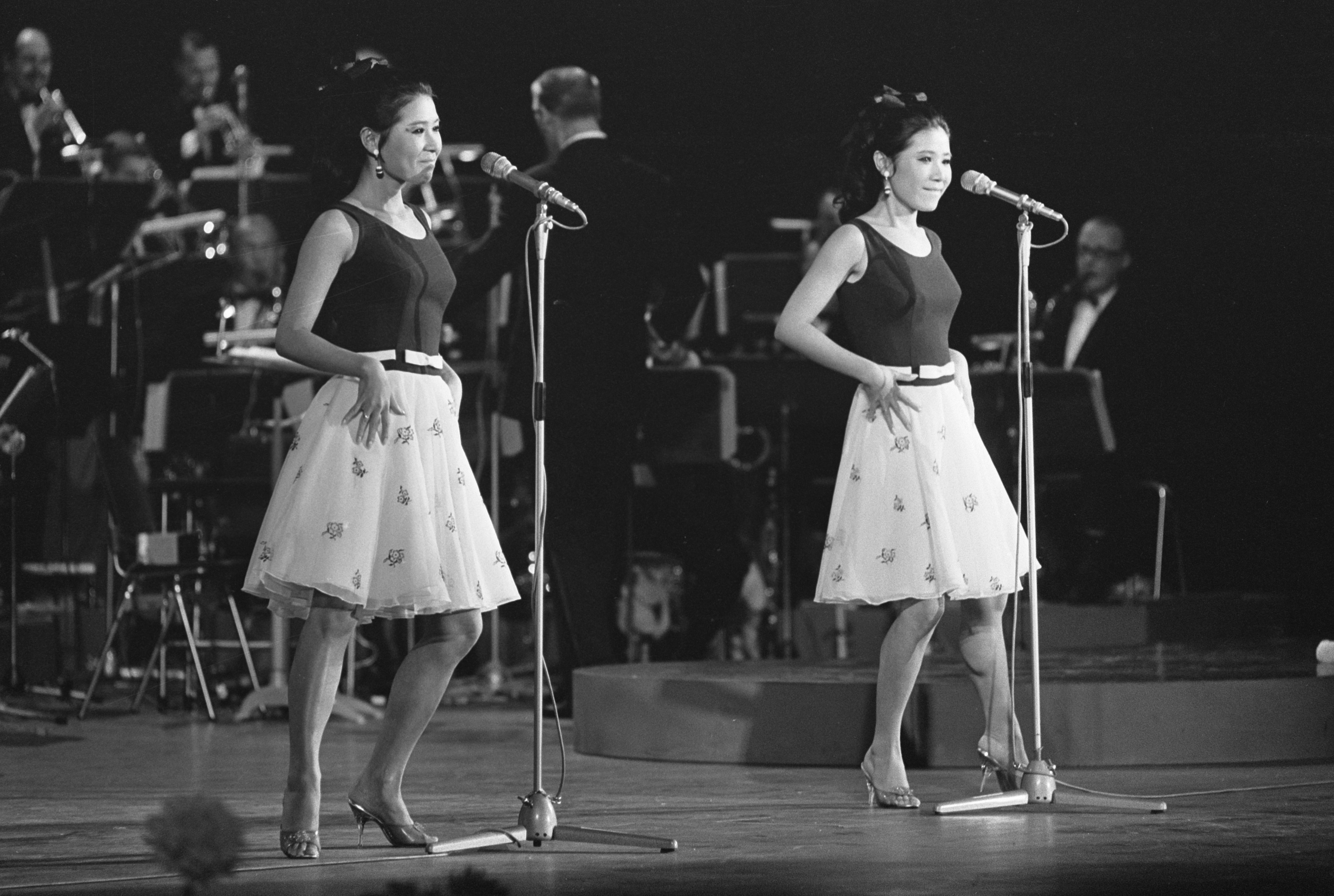 Collectie / Archief : Fotocollectie Anefo Reportage / Serie : Grand Gala du Disque in het concertgebouw te Amsterdam Beschrijving : Optreden van het Japanse zangduo The Peanuts Datum : 2 oktober 1966 Locatie : Amsterdam, Noord-Holland Trefwoorden : tweelingen, zangeressen Fotograaf : Fotograaf Onbekend / Anefo Auteursrechthebbende : Nationaal Archief Materiaalsoort : Negatief (zwart/wit) Nummer archiefinventaris : bekijk toegang 2.24.01.05 Bestanddeelnummer : 919-6259 Reacties Geplaatst door Geschiedenismens - Muziek op 26 november 2017 - 21:53. Grand Gala du Disque Populaire in het RAI congrescentrum Datum: 01 oktober 1966 (locatie Concertgebouw is onjuist en datum 2 oktober is onjuist)